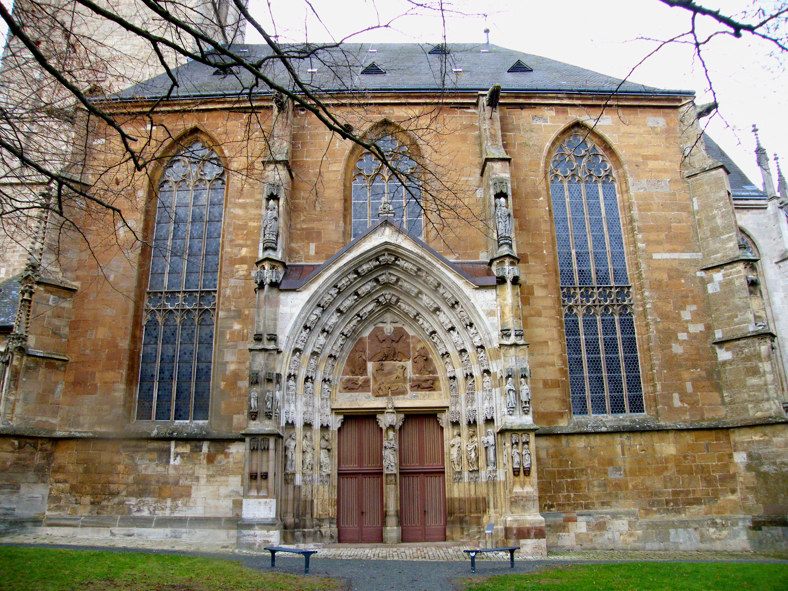 Korbach - Seitenansicht Kilianskirche